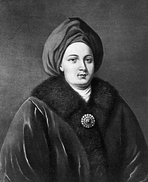 Марфа Алексеевна (1652—1707) - царевна, в иночестве Маргарита, вторая дочь царя Алексея Михайловича и его первой жены Марии Ильиничны Милославской, сестра царей Фёдора III и Ивана V Алексеевичей и сводная сестра царя Петра I.